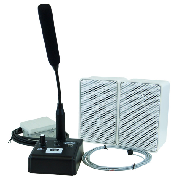 SWC2 ablakátbeszélő hangrendszer